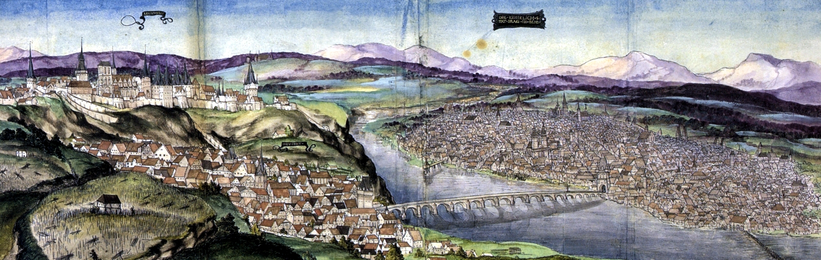 Ansicht von Prag aus dem Reisealbum Ottheinrichs